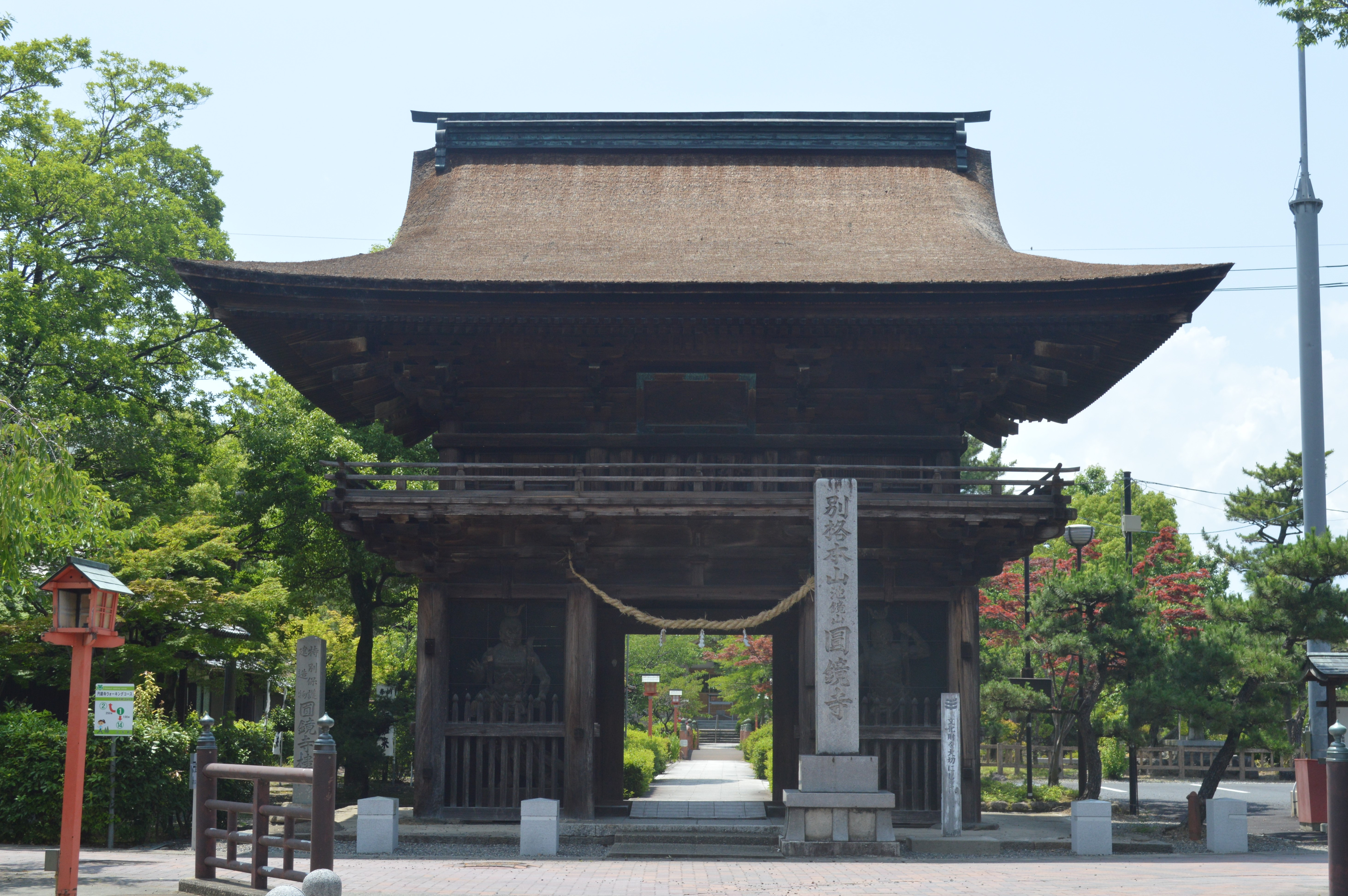 岐阜県本巣郡北方町にある円鏡寺。楼門。重要文化財。